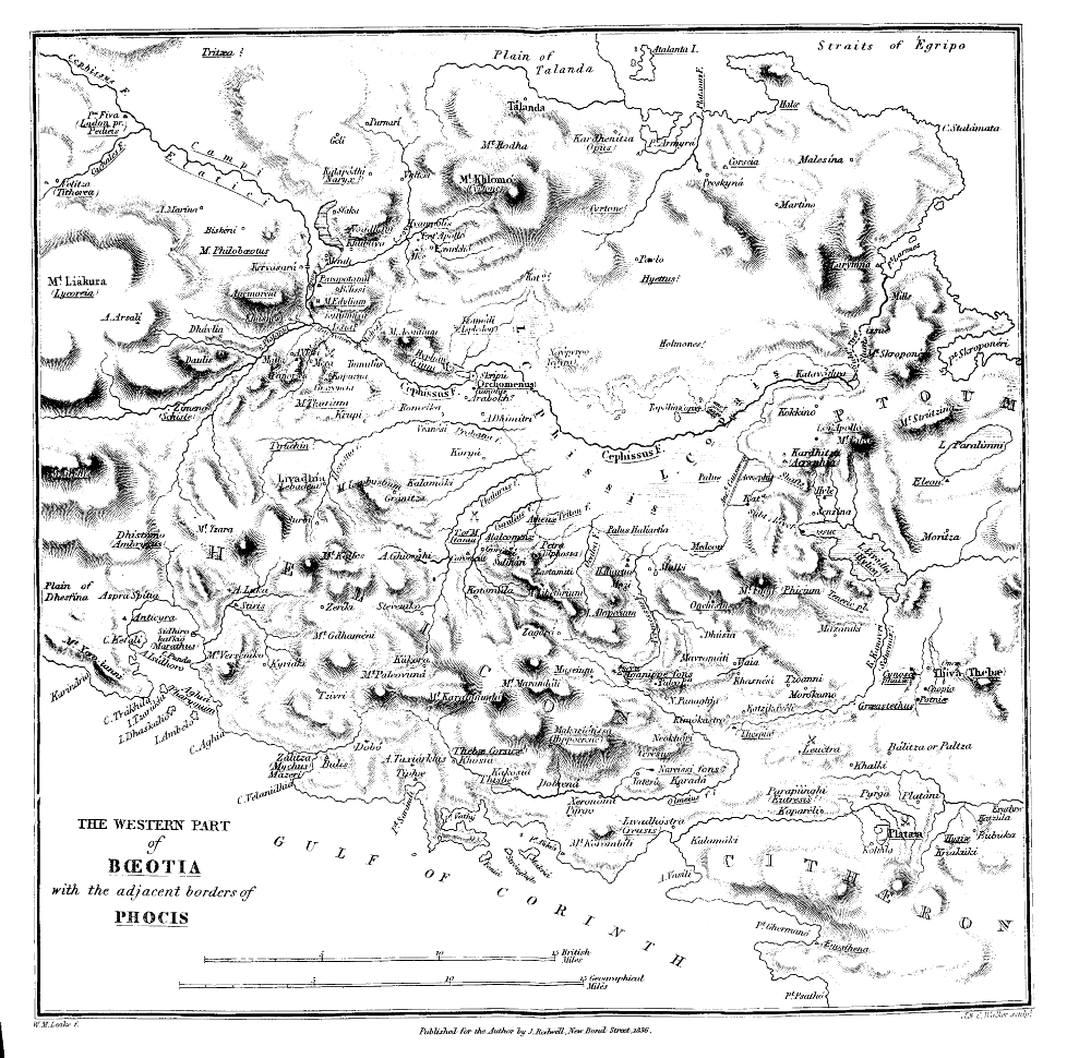 Map of ancient Boeotia. / Carta della Beozia antica. /Kaart van Boeotië in de oudheid.